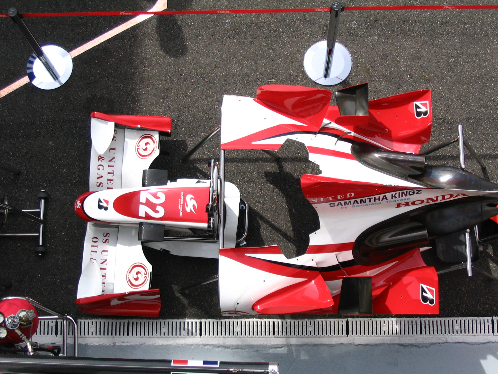 Circuit de Magny Court, Grand Prix de France